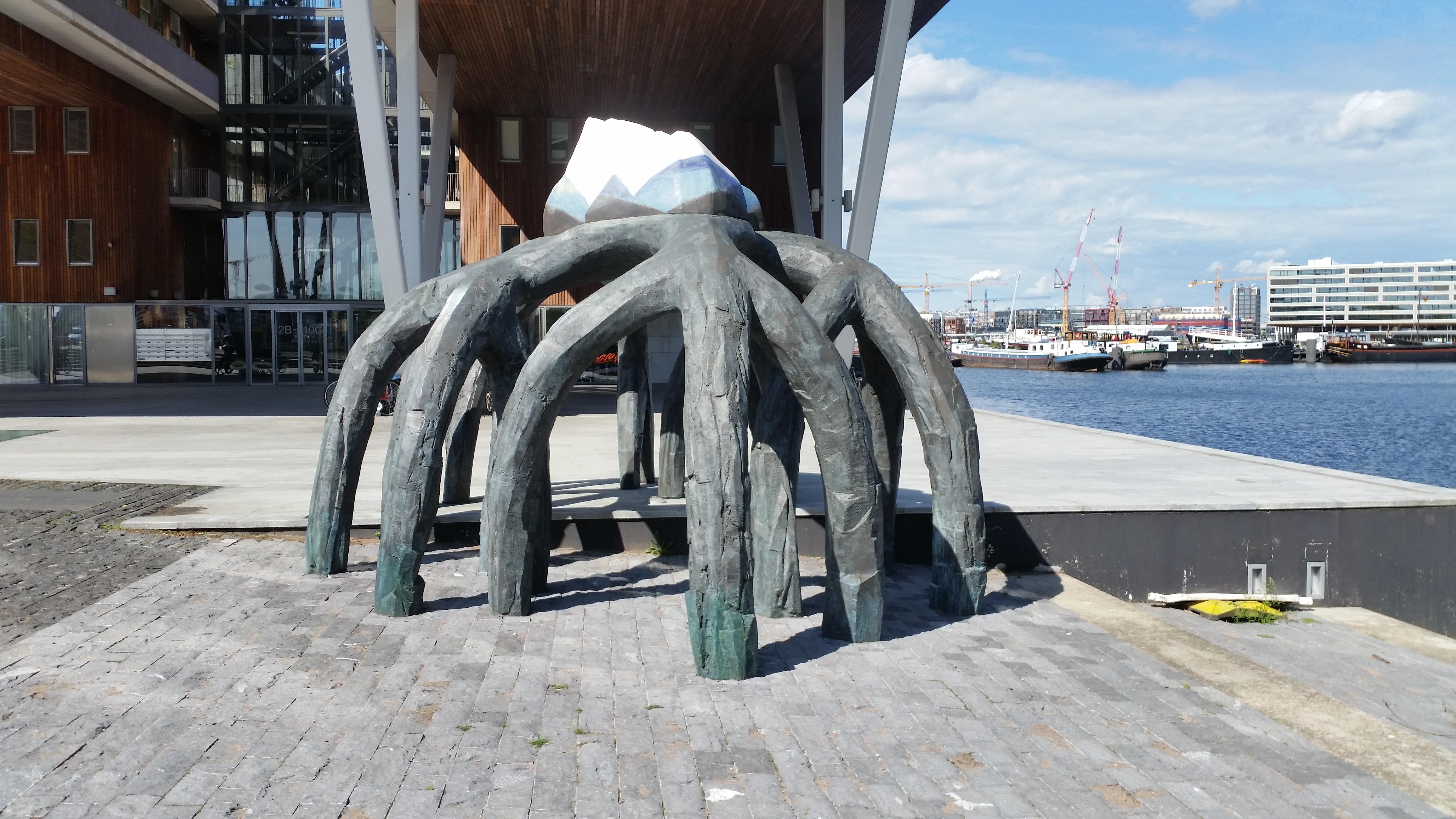 Islanded van Anneke de Witte aan de Van Diemenstraat, Amsterdam-Centrum, Islanded wordt "opgegeten" door IJside